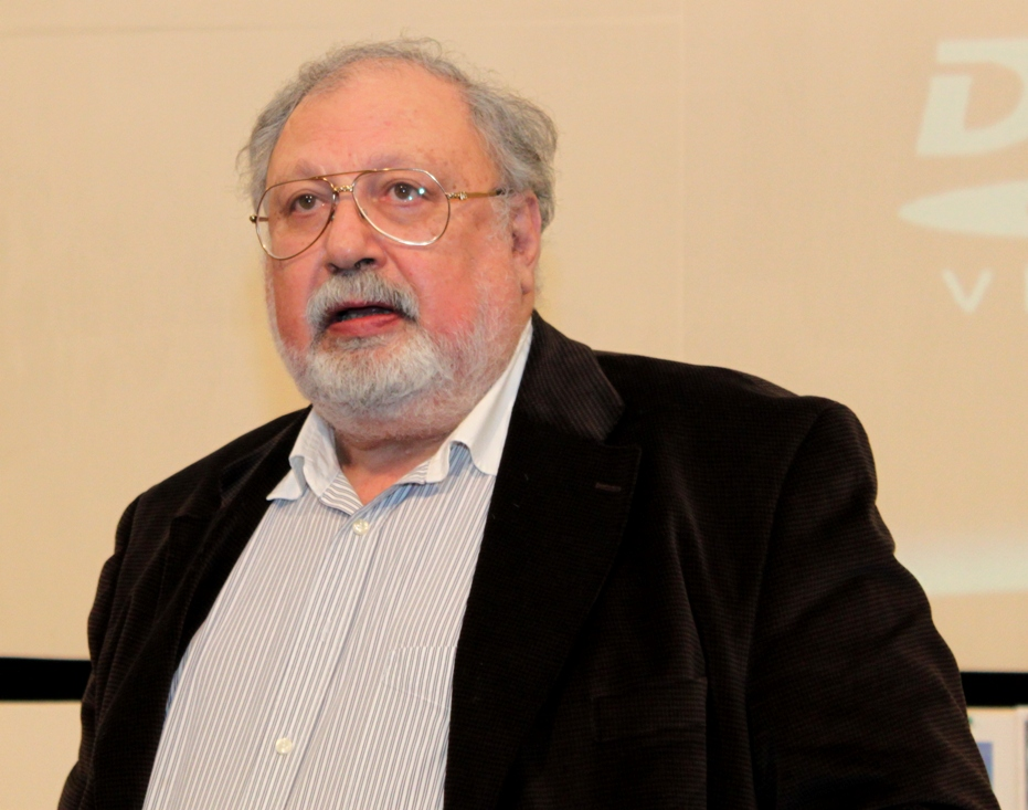 Рустам Ибрагимбеков.